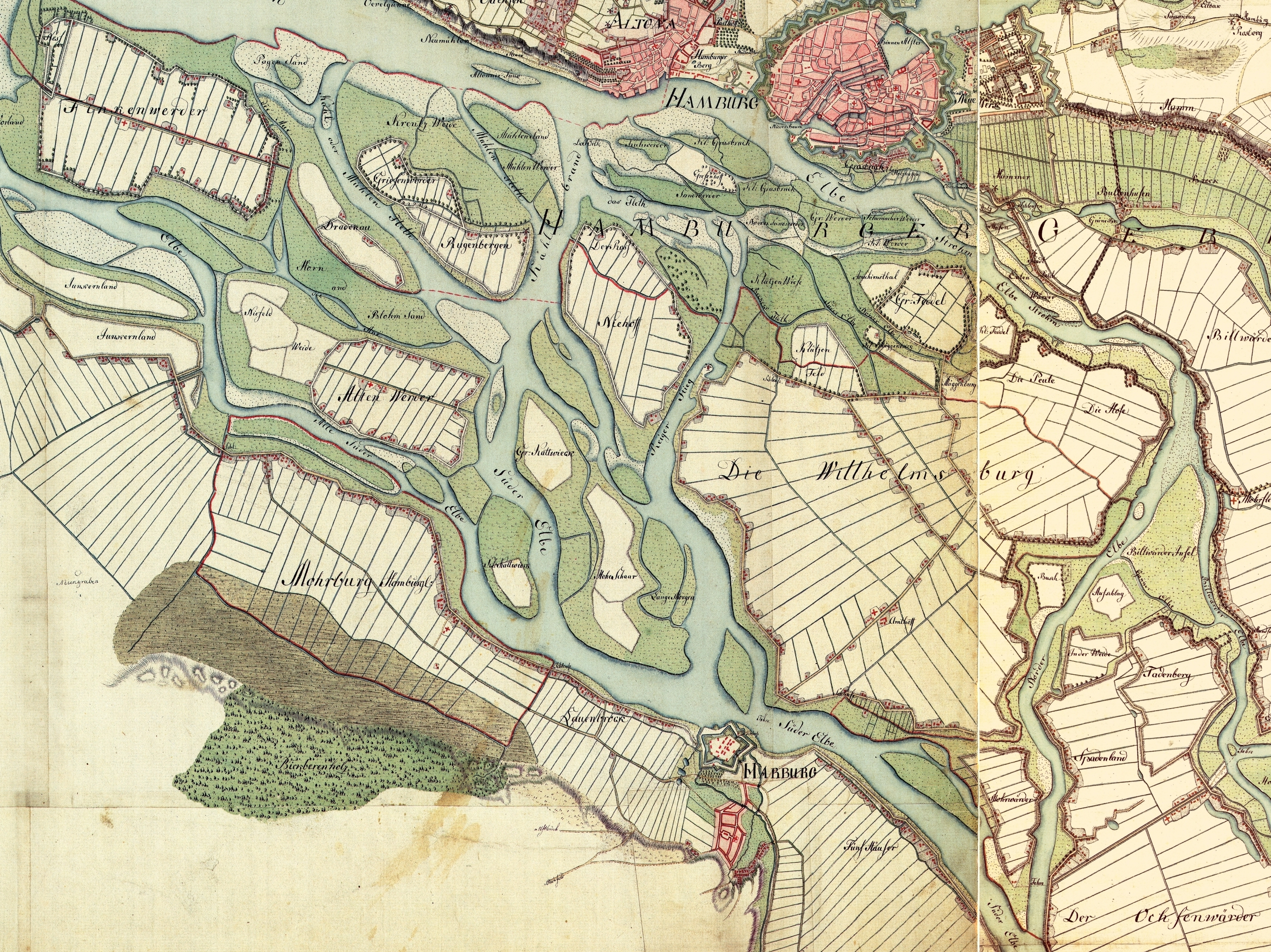 Altona, Hamburg, Harburg. Aufgenommen in den Jahren 1789 bis 1796 unter der Direktion des Majors Gustav Adolf von Varendorf durch Offiziere des Schleswigschen Infanterieregiments Bergedorf, Reinbek. Aufgenommen in den Jahren 1789 bis 1796 unter der Direktion des Majors Gustav Adolf von Varendorf durch Offiziere des Schleswigschen Infanterieregiments